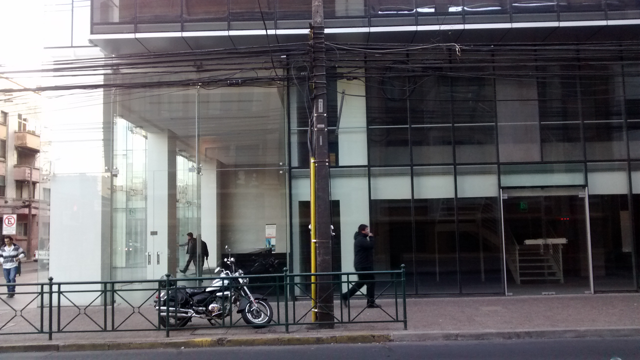 Planta baja del edificio Capital de la ciudad de Temuco, Chile.